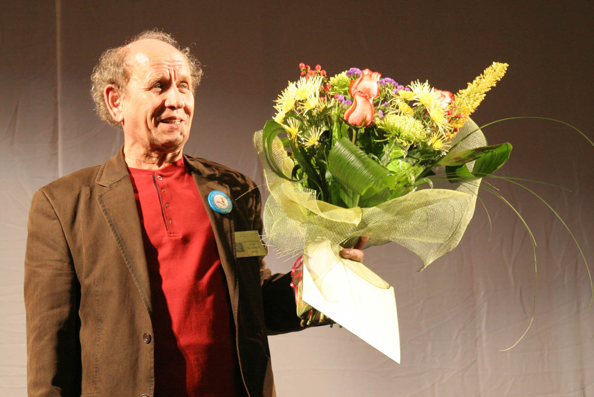 Художественный руководитель Саратовского театра юного зрителя актёр и режиссёр Юрий Петрович Ошеров